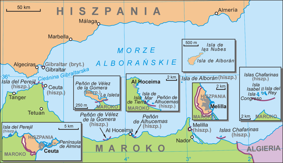 Mapa hiszpańskich posiadłości w Afryce Północnej: Ceuty, Melilli oraz wysp: Alborán, Perejil, Islas Chafarinas, Peñón de Alhucemas i Peñón de Vélez de la Gomera